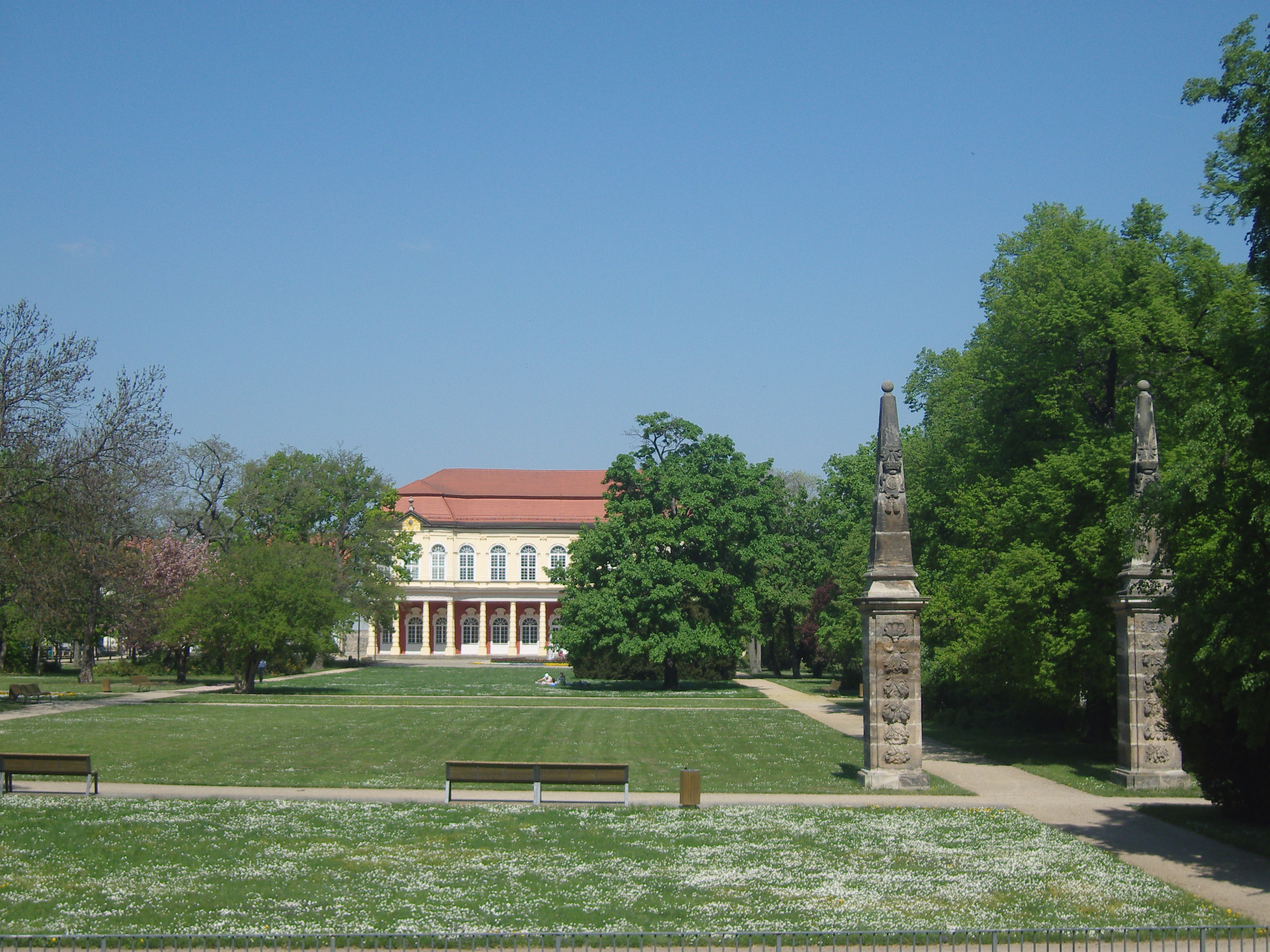 Blick in den Schlosspark Merseburg